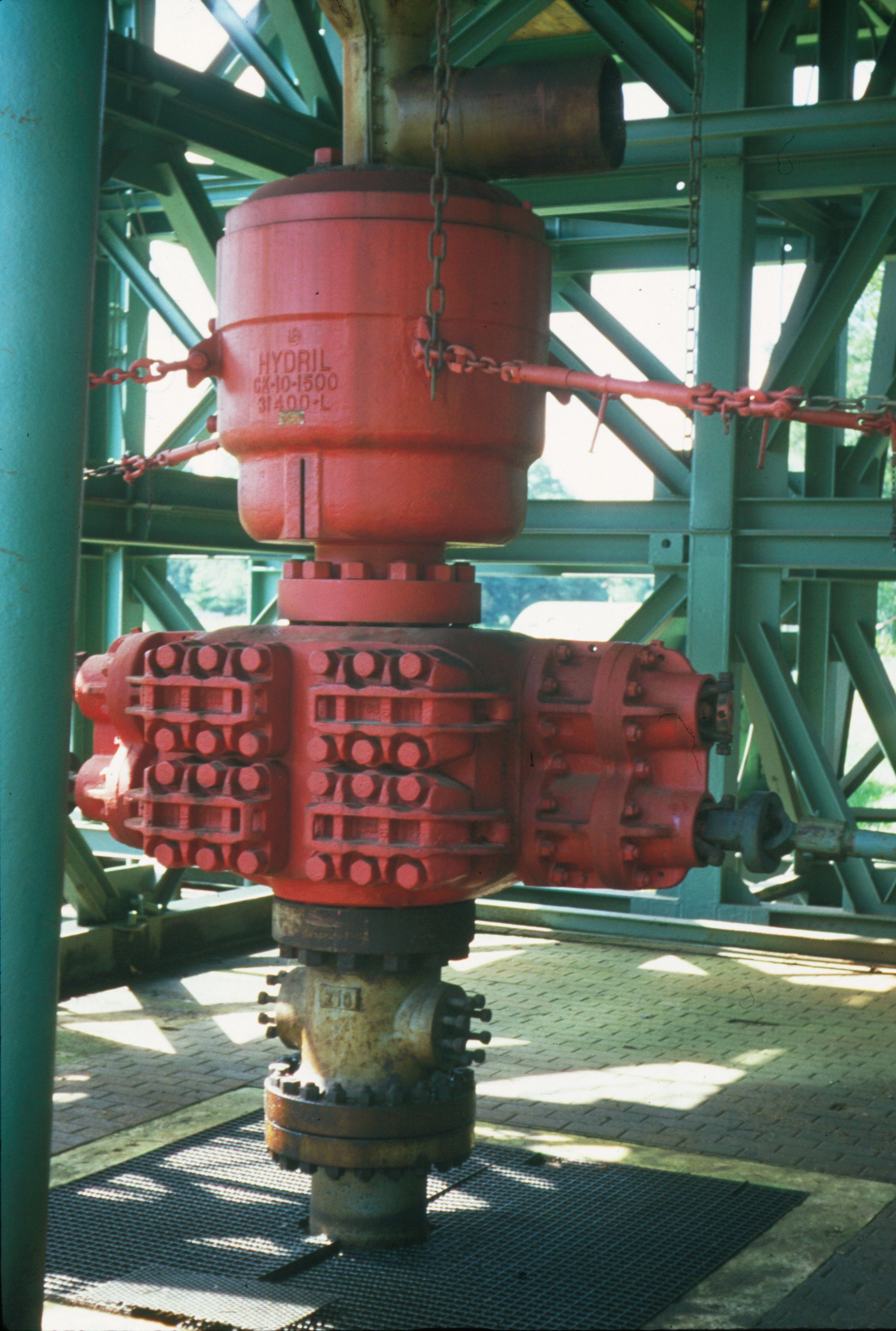 preventer at an oil drilling tower, Deutsches Erdoelmuseum Wietze, Germany